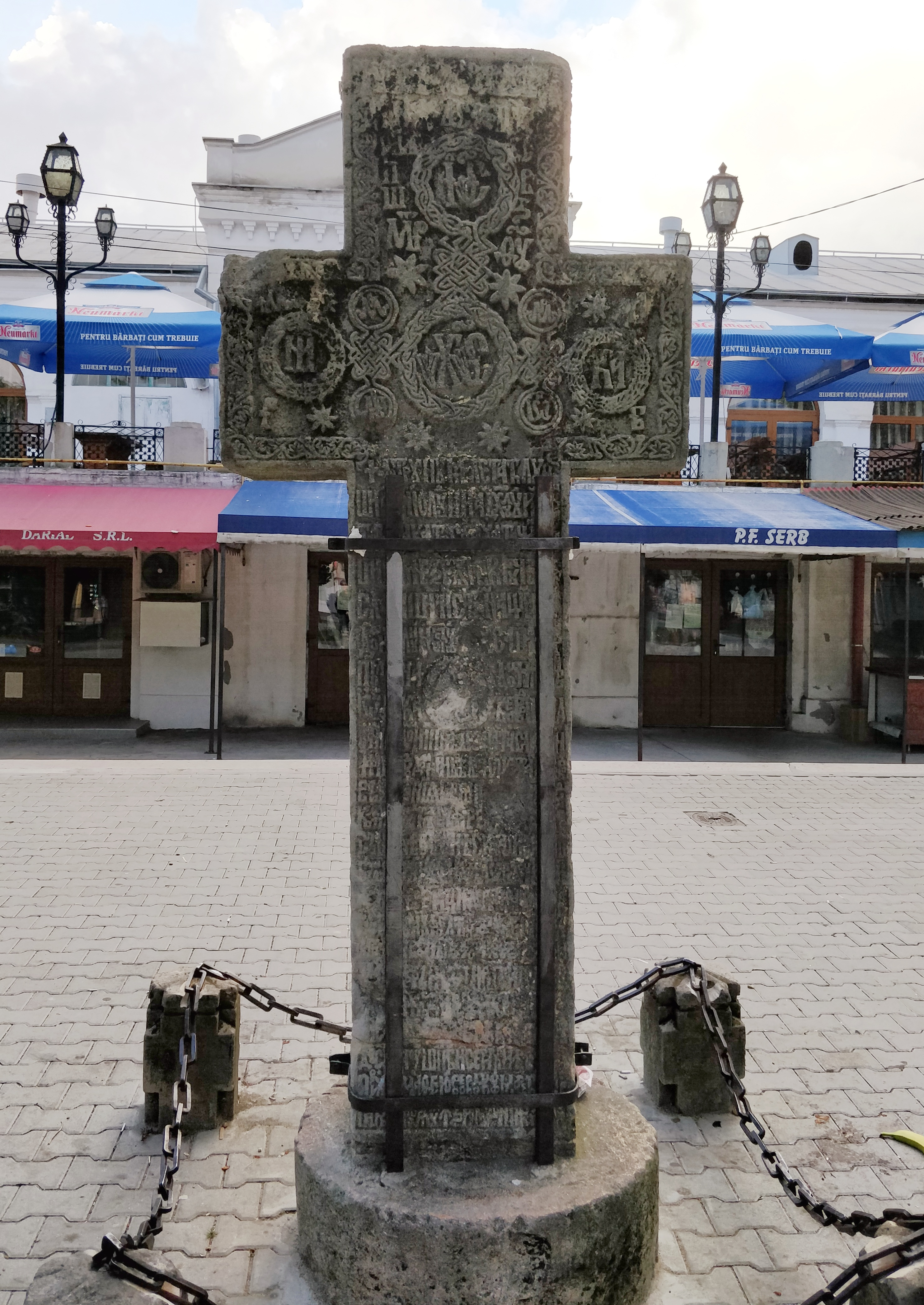 Cruce de piatră „a pârgarilor”